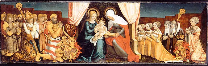 Hans Baldung: Markgrafentafel (ganz)